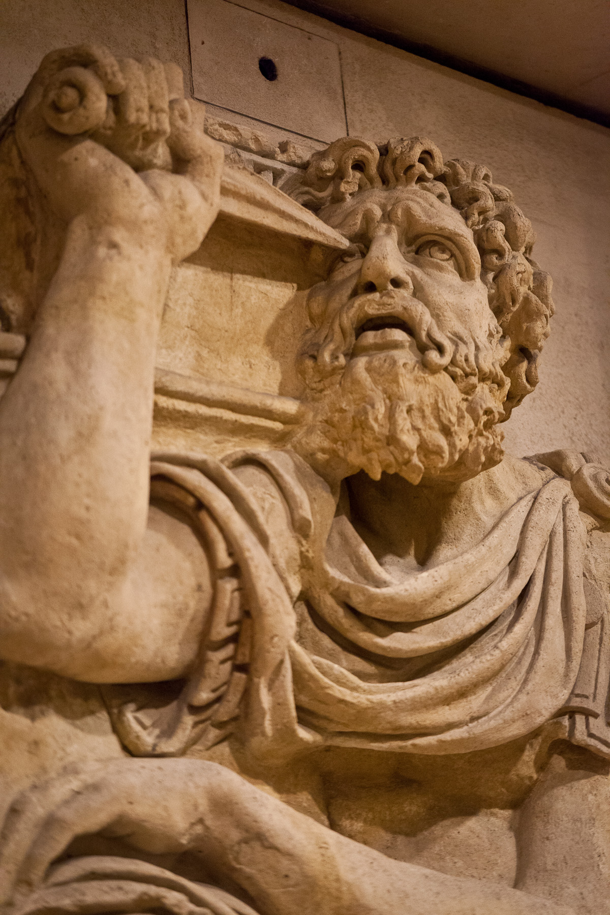 Zaleucus : législateur grec (7e s. av. J.-C.) avait édicté une loi condamnant à l'aveuglement les coupables d'adultère. Son fils étant condamné, il le contraint à se crever un oeil et se crève lui-même l'autre. Atelier de Jean Goujon vers 1560-1564. Relief provenant de l'attique de l'aile sud de la Cour Carrée. Démonté en 1807 pour les aménagements napoléoniens.